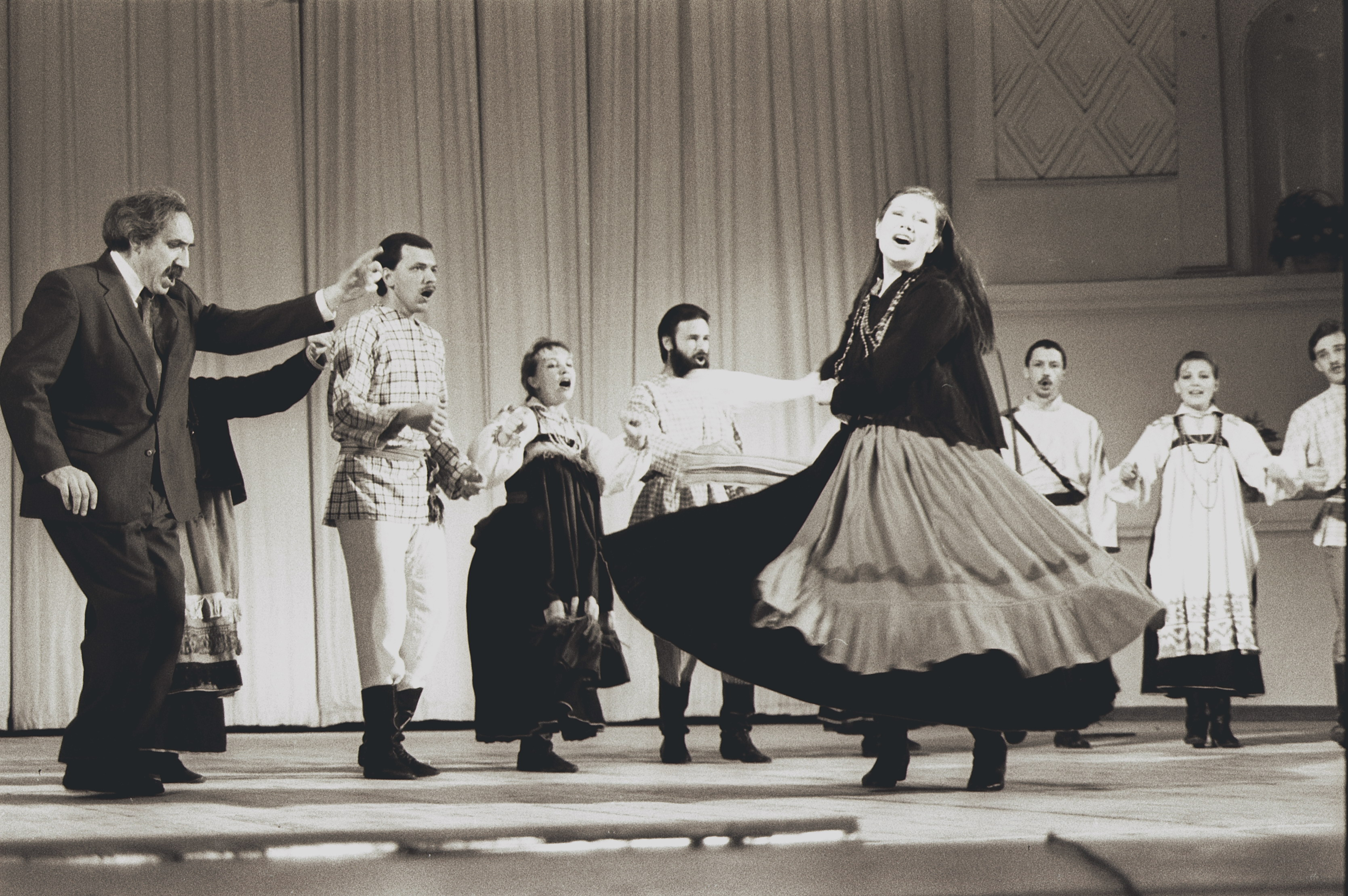 Концертное выступление ансамбля Дмитрия Покровского в 1992 году.